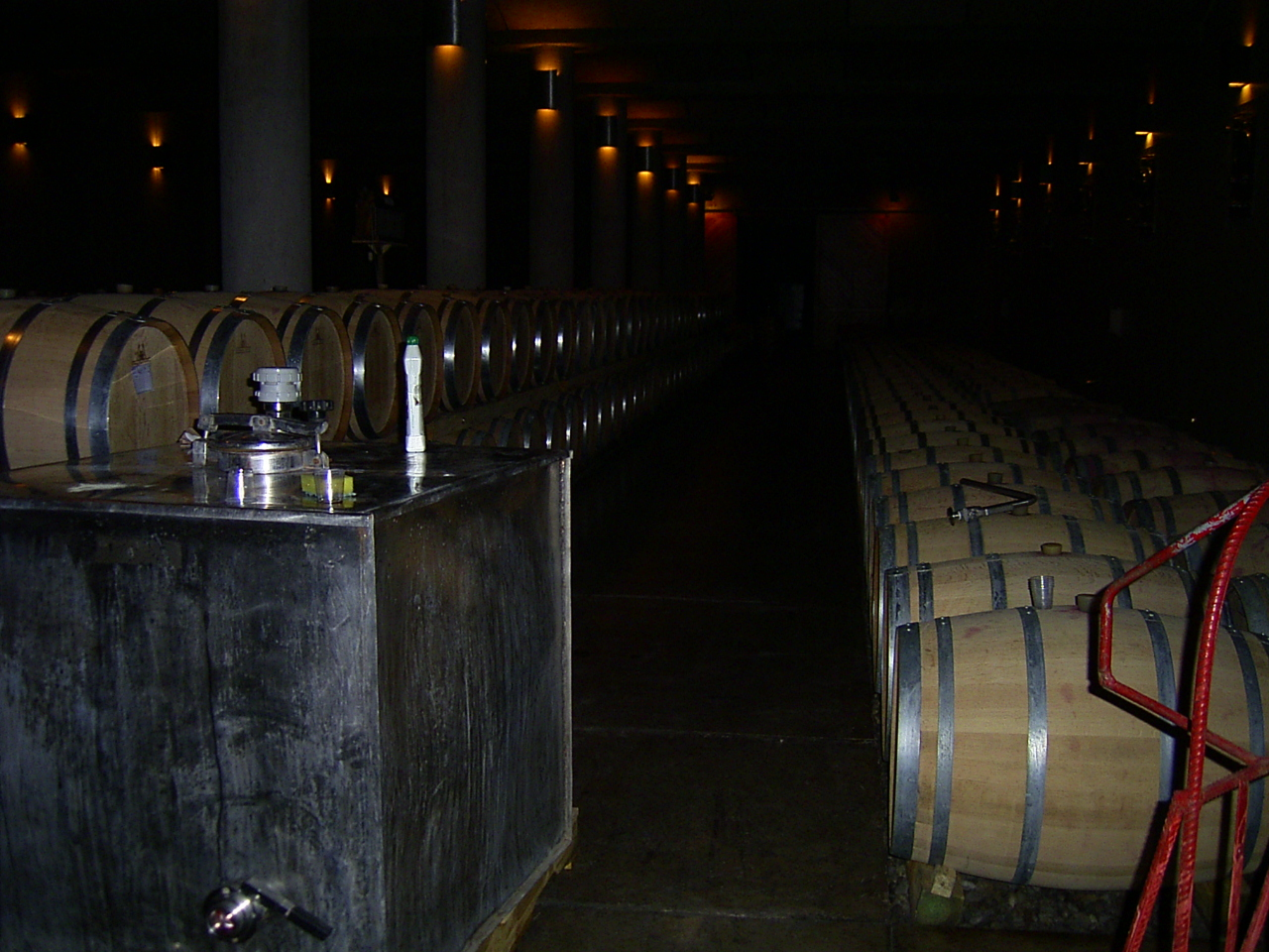 Bilete frå vinkjellaren til Odfjell Wineyards i Chile. Bilete teke av Guttorm Flatabø hausten 2003.